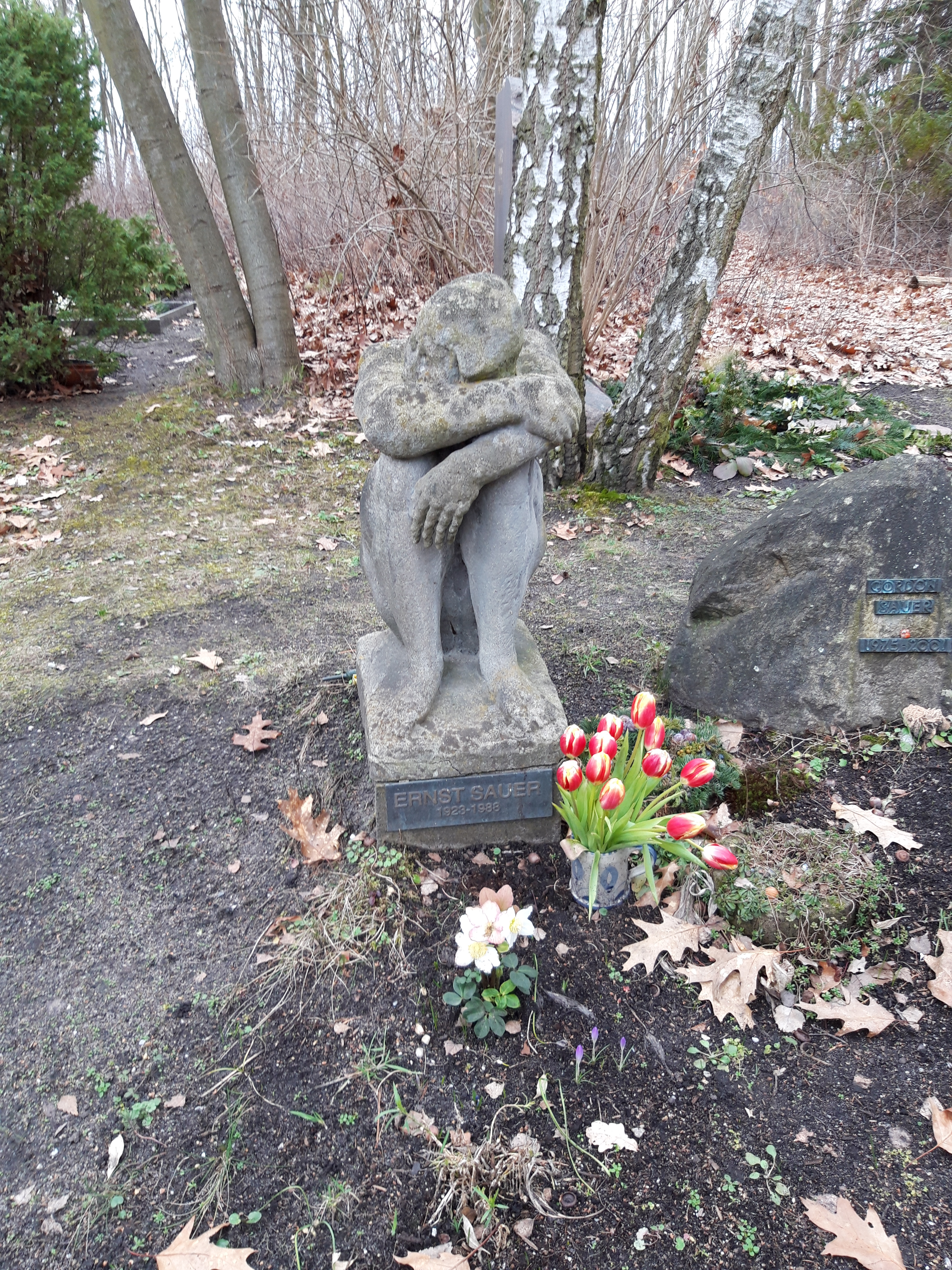 Grab von Ernst Sauer auf dem Waldfriedhof Senftenberg